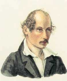 Михаил Карлович Кюхельбекер (1798—1859) — лейтенант Гвардейского экипажа, декабрист.